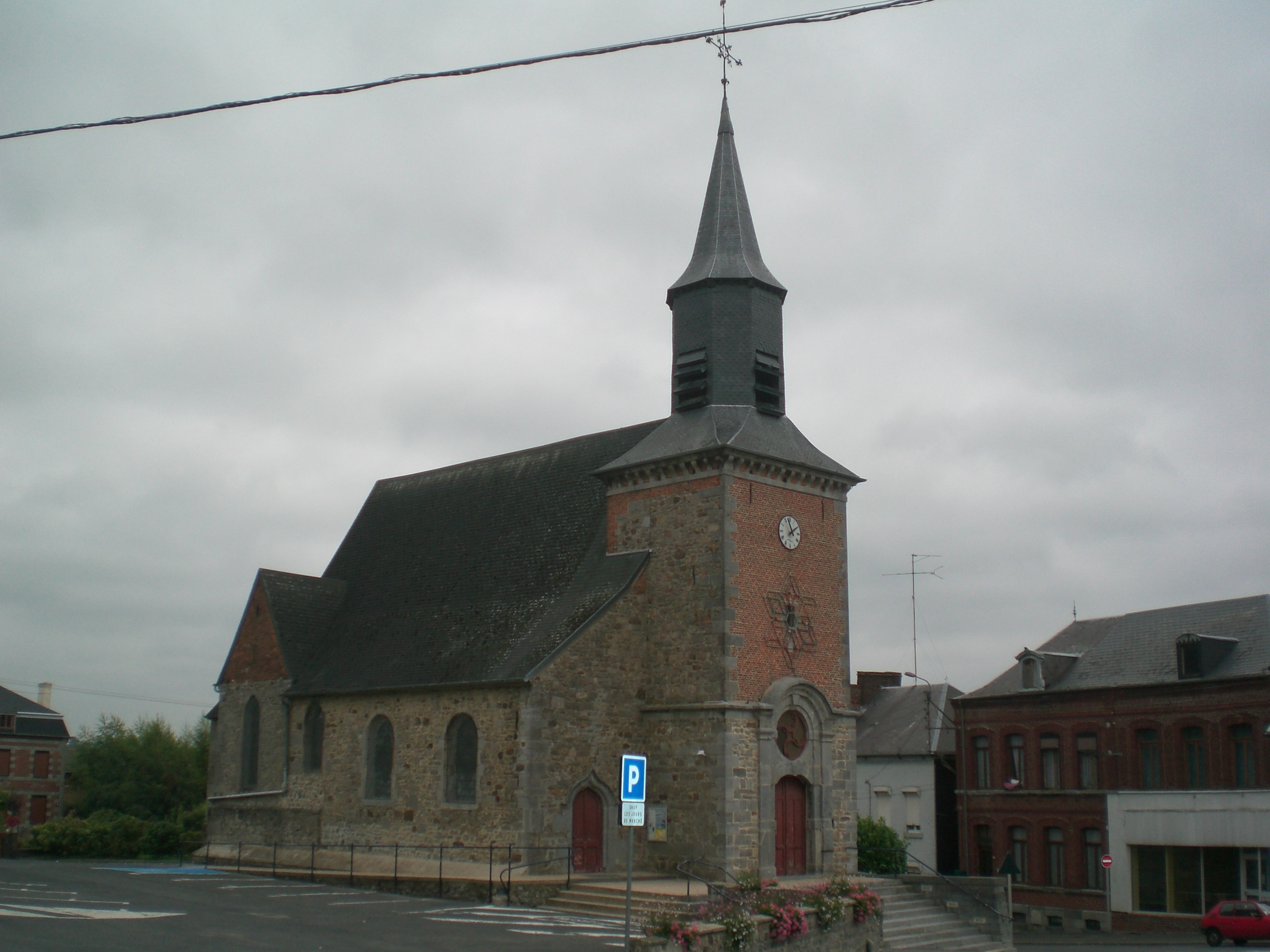 eglise de Sains-du-Nord nord france